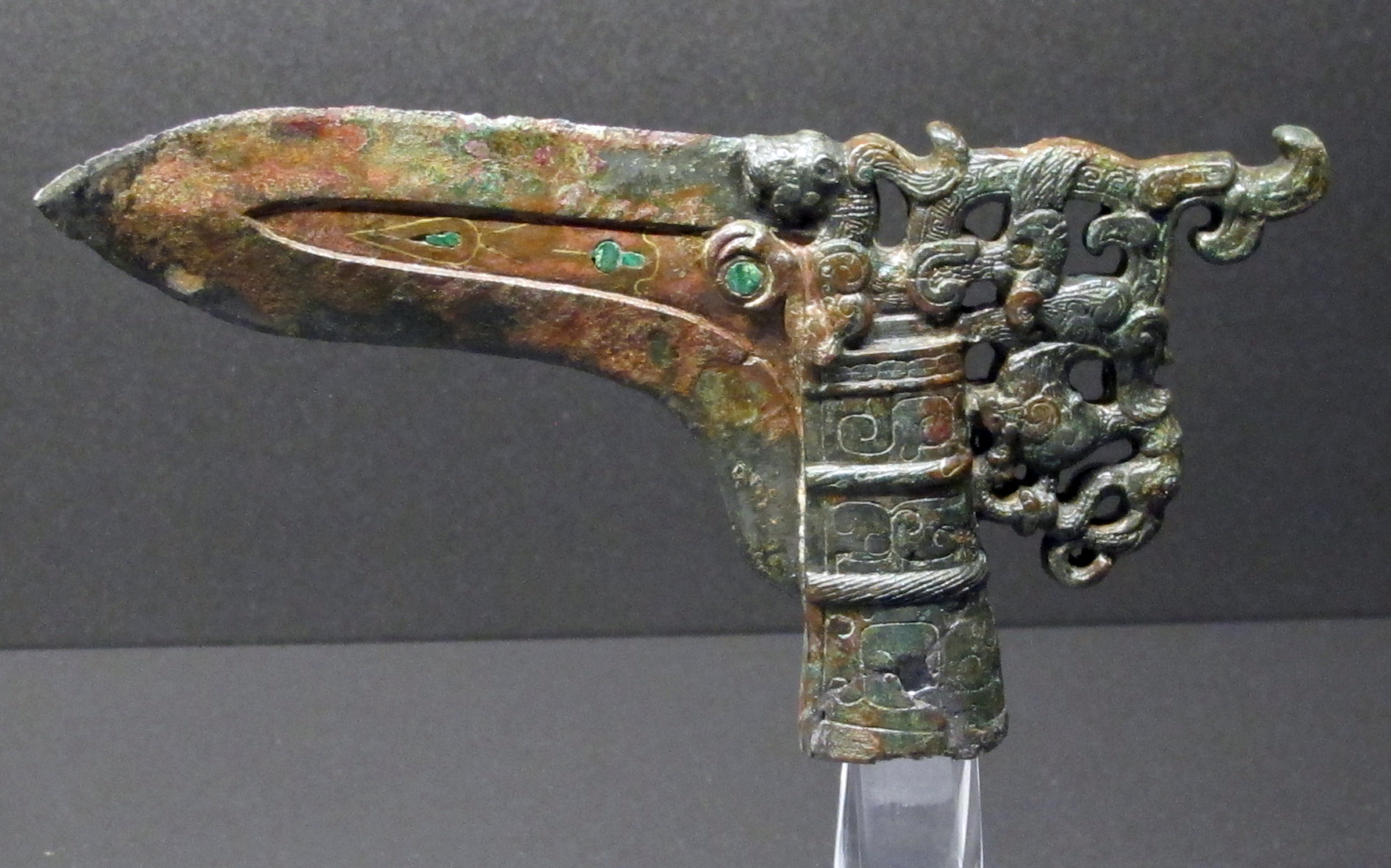 Periodo primavera e autunno, ascia o alabarca (ge), V sec. ac.